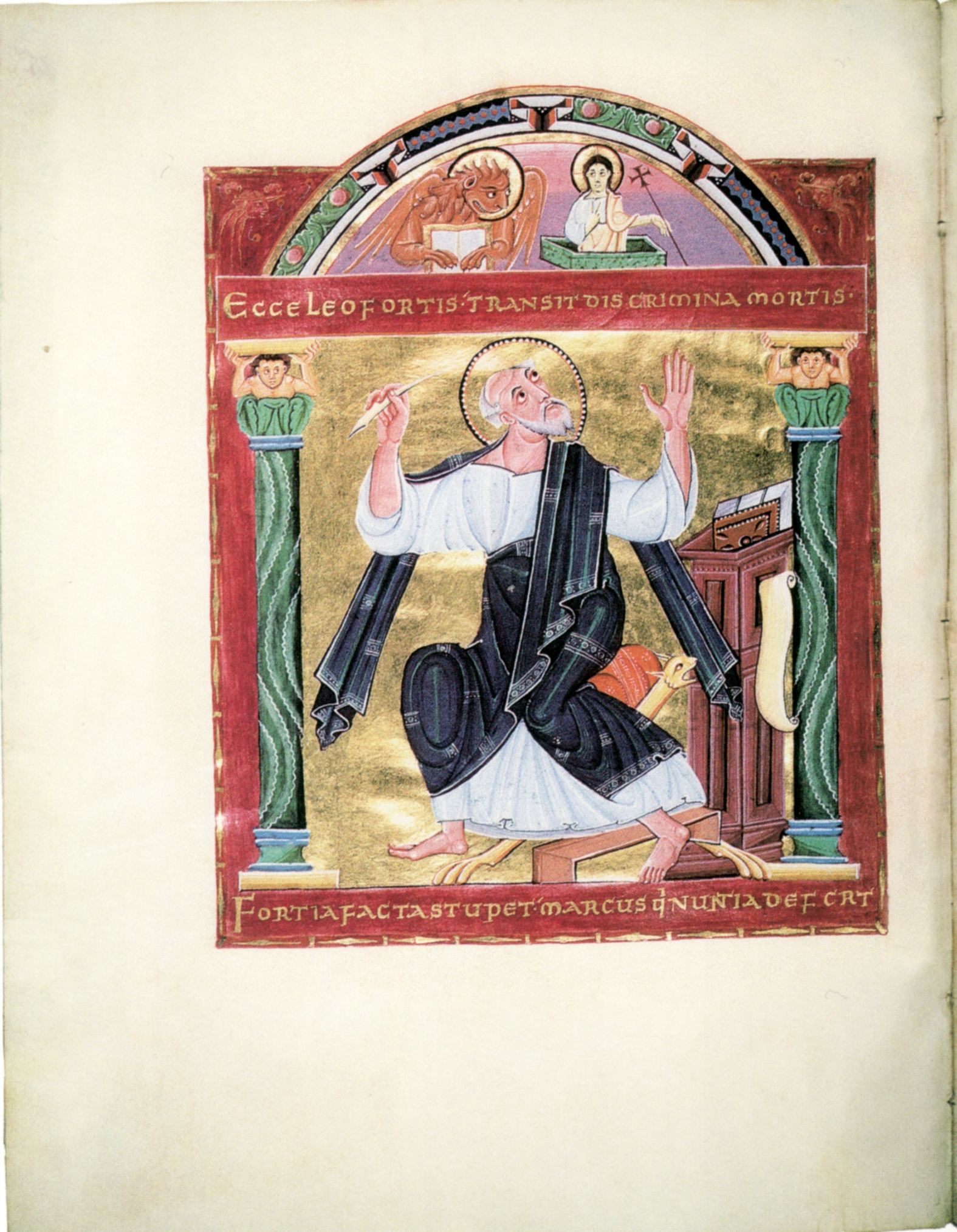 Evangeliar aus Bamberg (Bayrische Staatsbibliothek, Clm 4454), fol. 86v. Evangelist Markus. Reichenauer Buchmalerei.